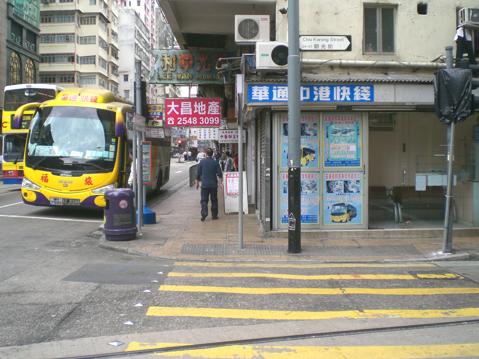 西營盤德輔道西近朝光街的港中跨境巴士站